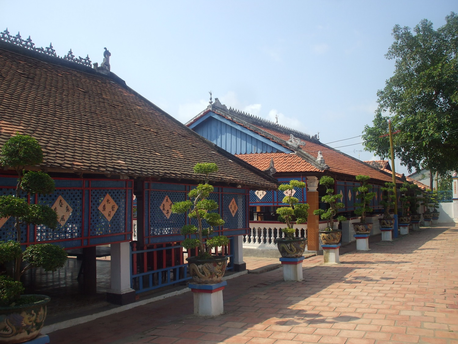 Một dãy nhà trong khu Nhà Lớn Long Sơn (Vũng Tàu-Bà Rịa, Việt Nam)